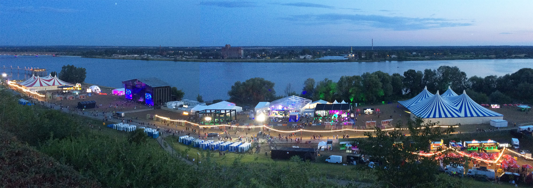 Audioriver